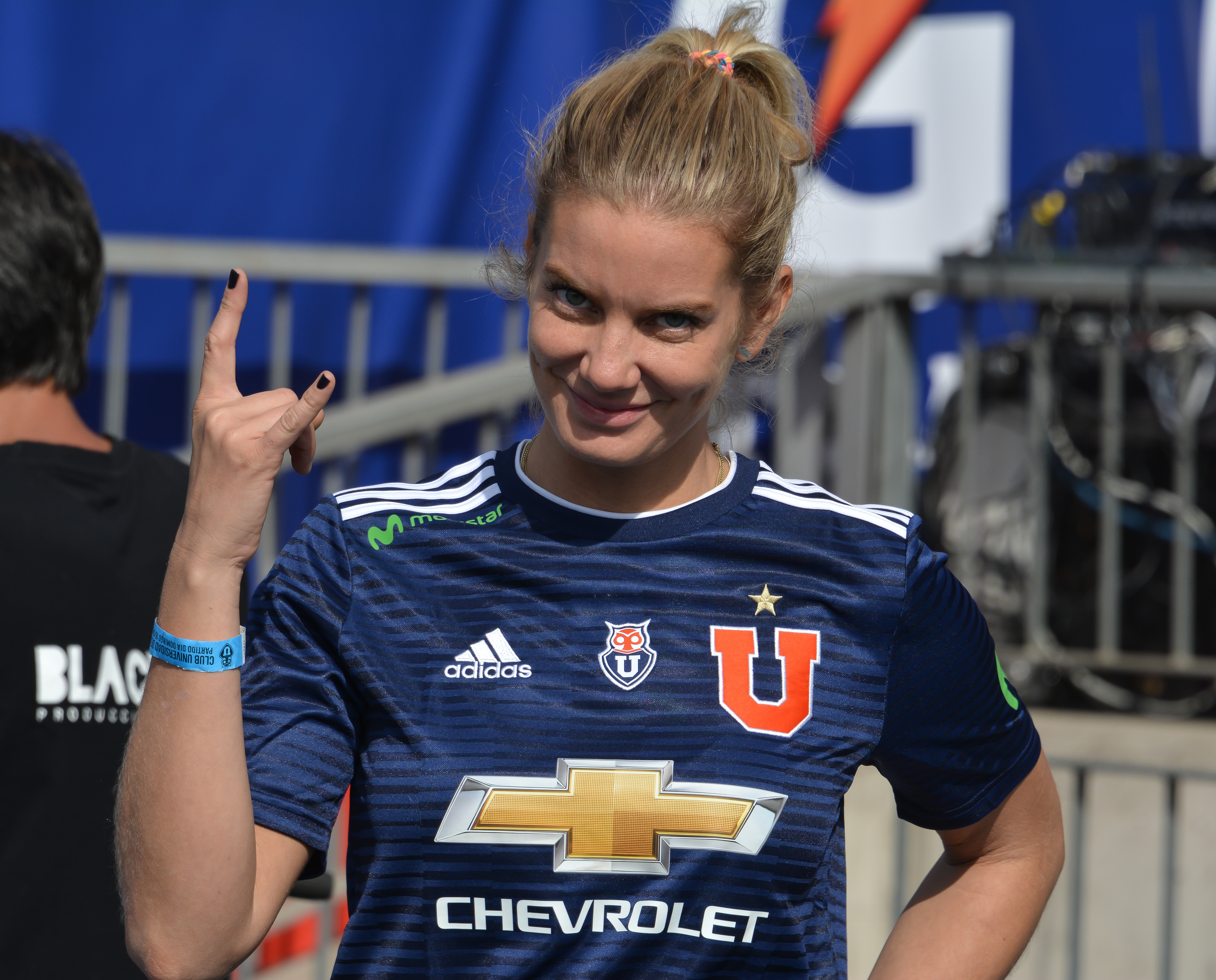 Javiera Acevedo, Universidad de Chile v Colo-Colo, Estadio Nacional, Santiago, Chile.